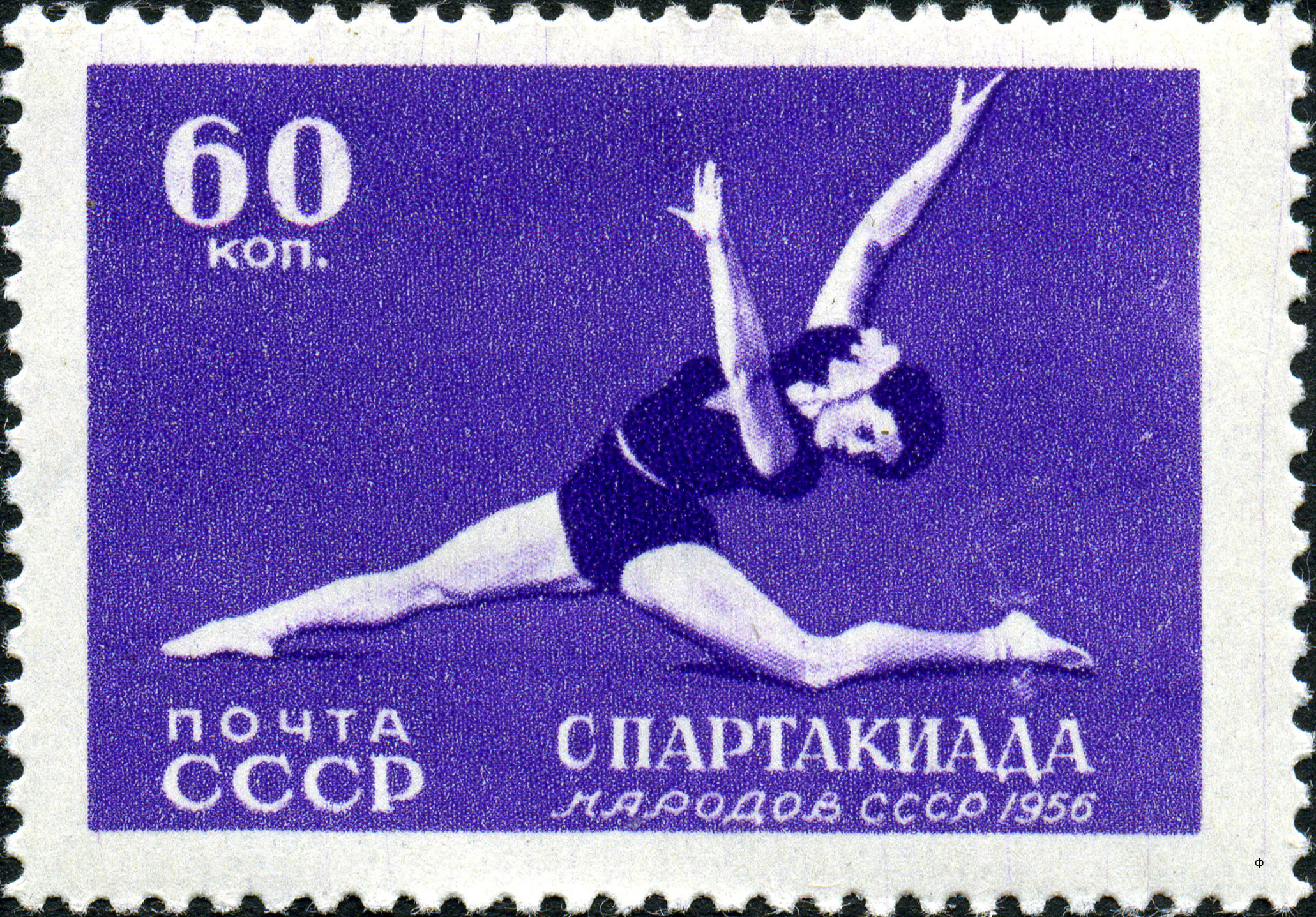 Марка СССР, посвященная I летней Спартакиаде народов СССР. На ней изображено выступление гимнастки Софьи Муратовой в вольных упражнениях на XIII чемпионате СССР, по фотографии, опубликованной в журнале «Физкультура и спорт» №2, 1950 год (источник — книга Николая Кочеткова «О чём умолчали каталоги», Москва, «Марка», 2007 год).